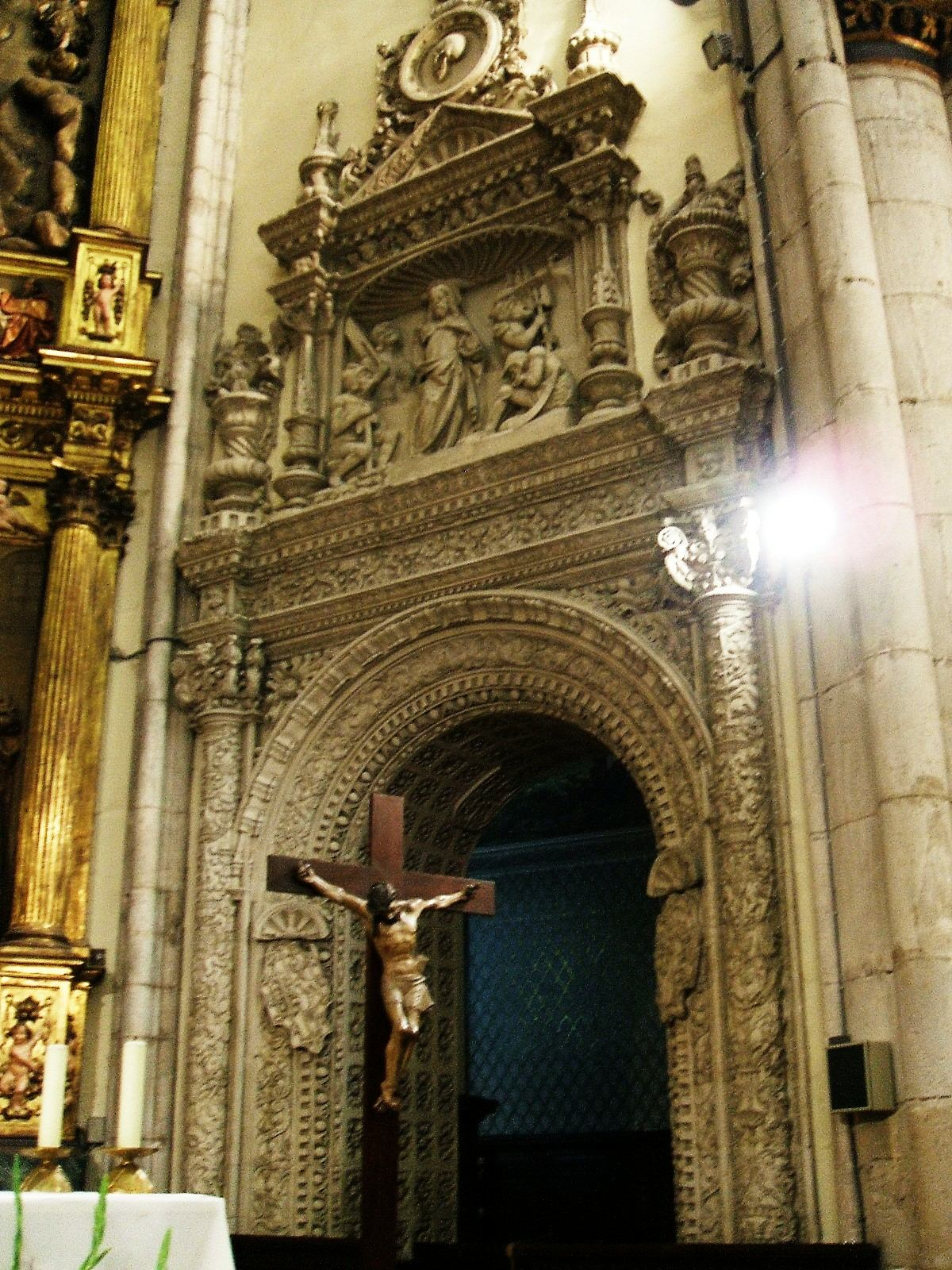 Sepulcro de los Arriaga, iglesia de San Miguel Arcángel, Vitoria-Gasteiz